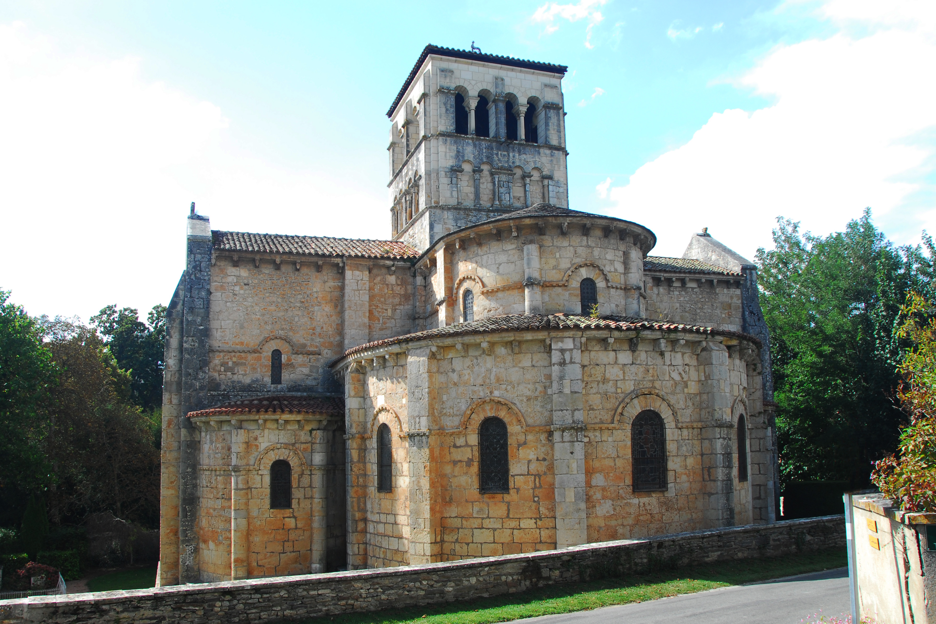 Ste-Croix de Veauce, Chothaupt von SW